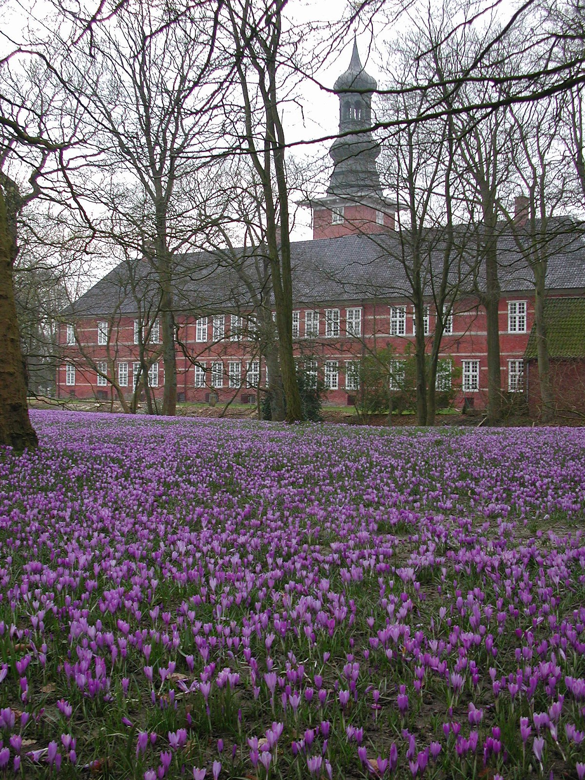 Schloss vor Husum. Blick von außen auf den Ostflügel während der Krokusblüte im Schlosspark.